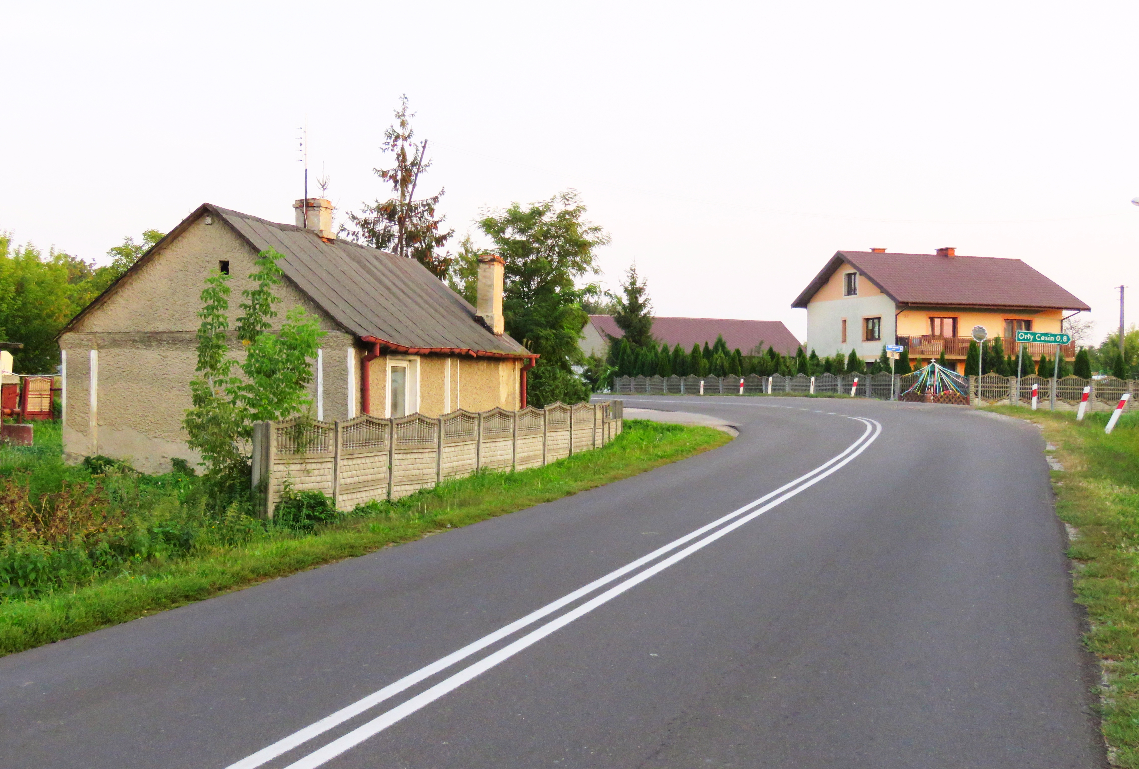 NOWE MOSTKI